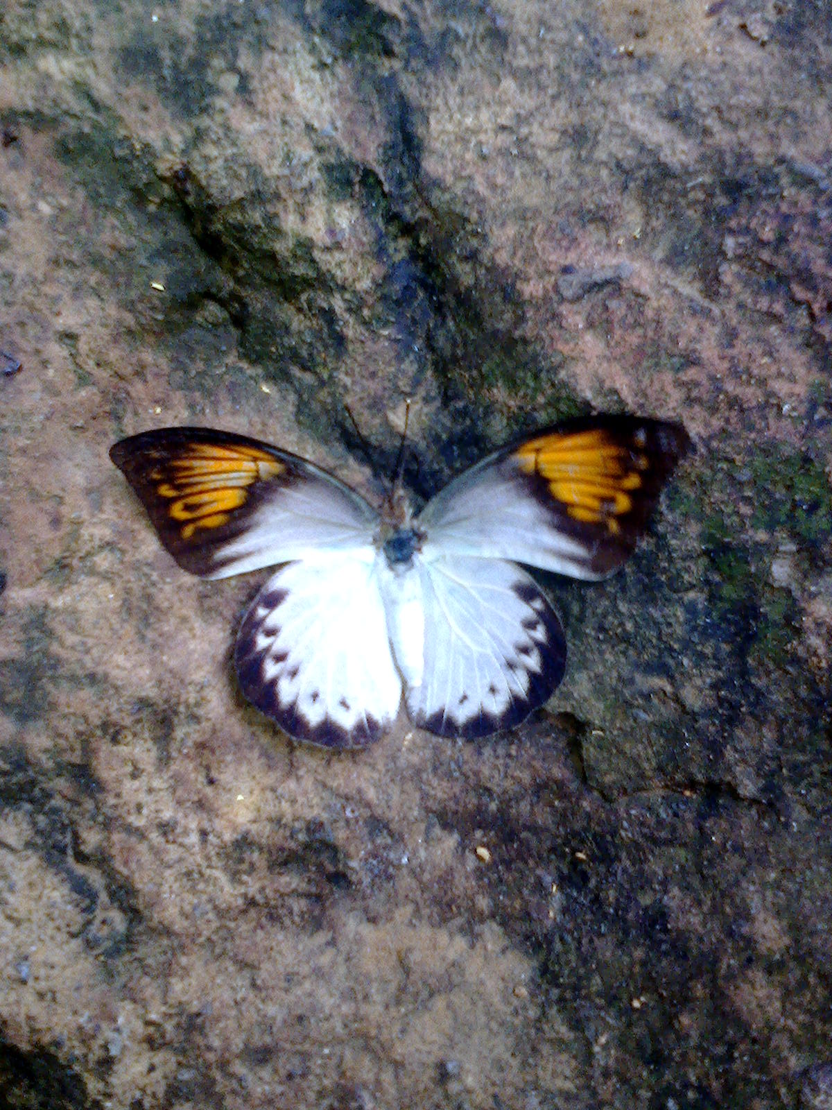 Female